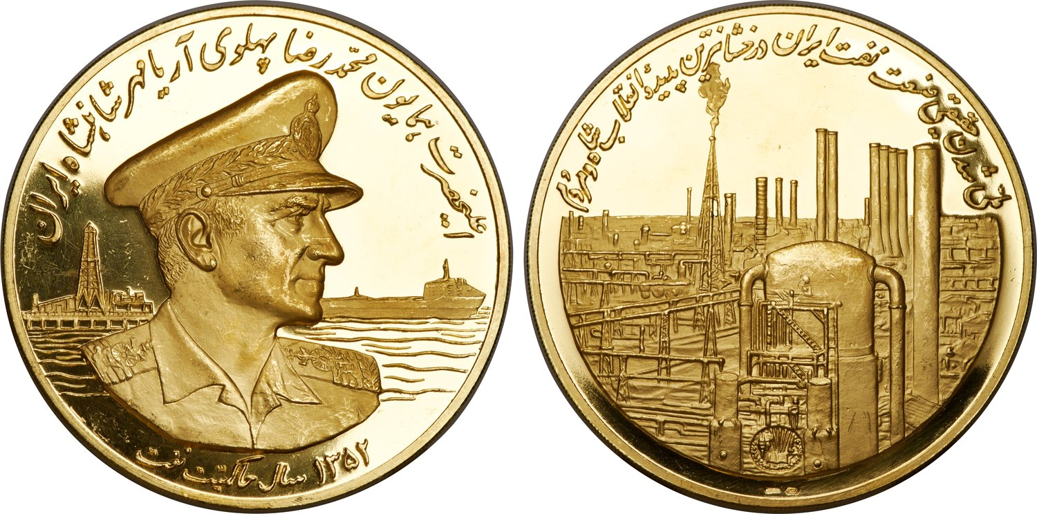 یادبود سال حاکمیت نفت به سفارش مؤسسه اعتباری دانشگاه که آرم این مؤسسه در پشت مدال در قسمت پایین نقر شده است.